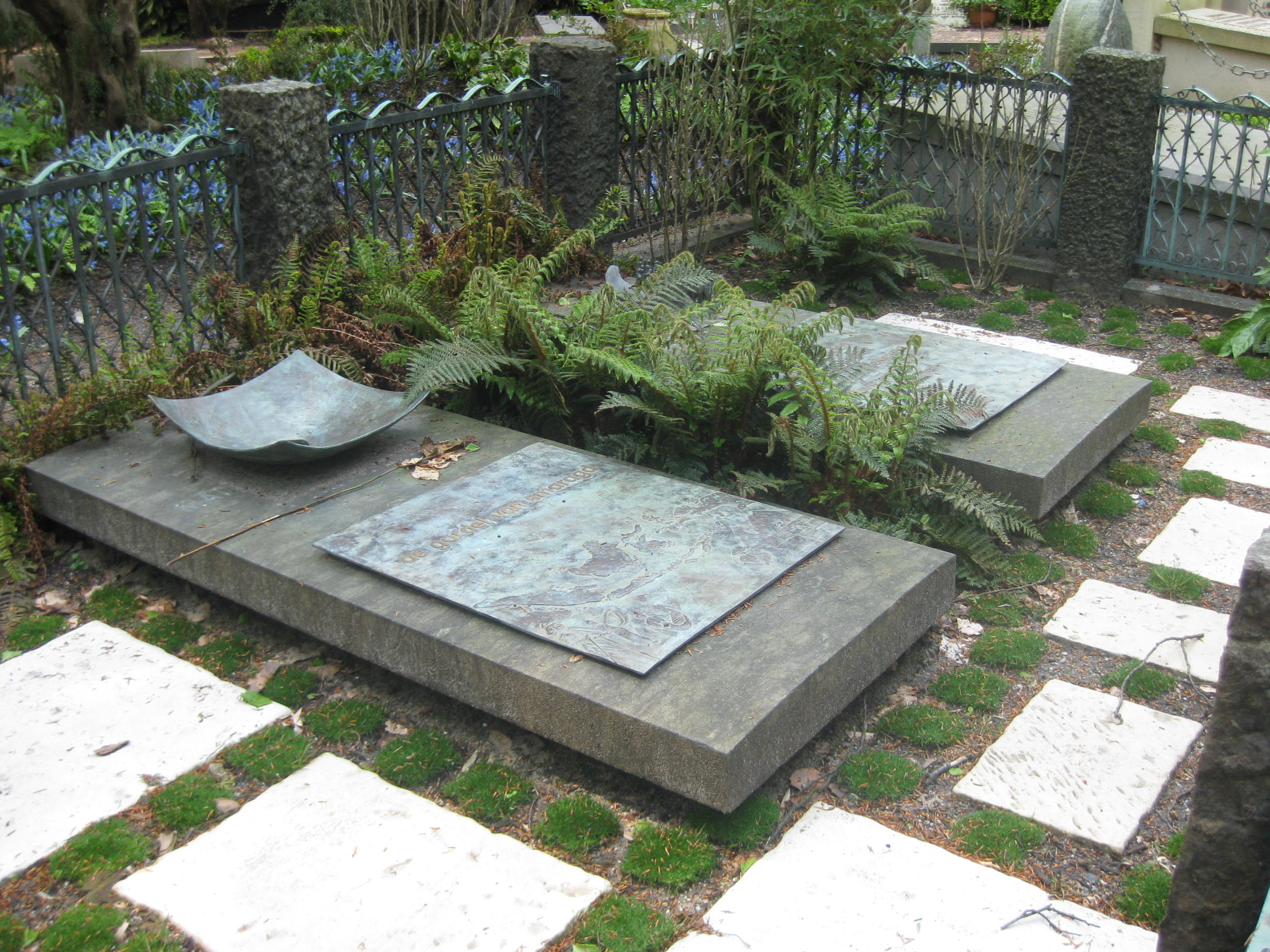 Gordel van Smaragd, herdenkingsmonument voor de gevallenen in Nederlands-Indië op Zorgvlied, begraafplaats in Amsterdam